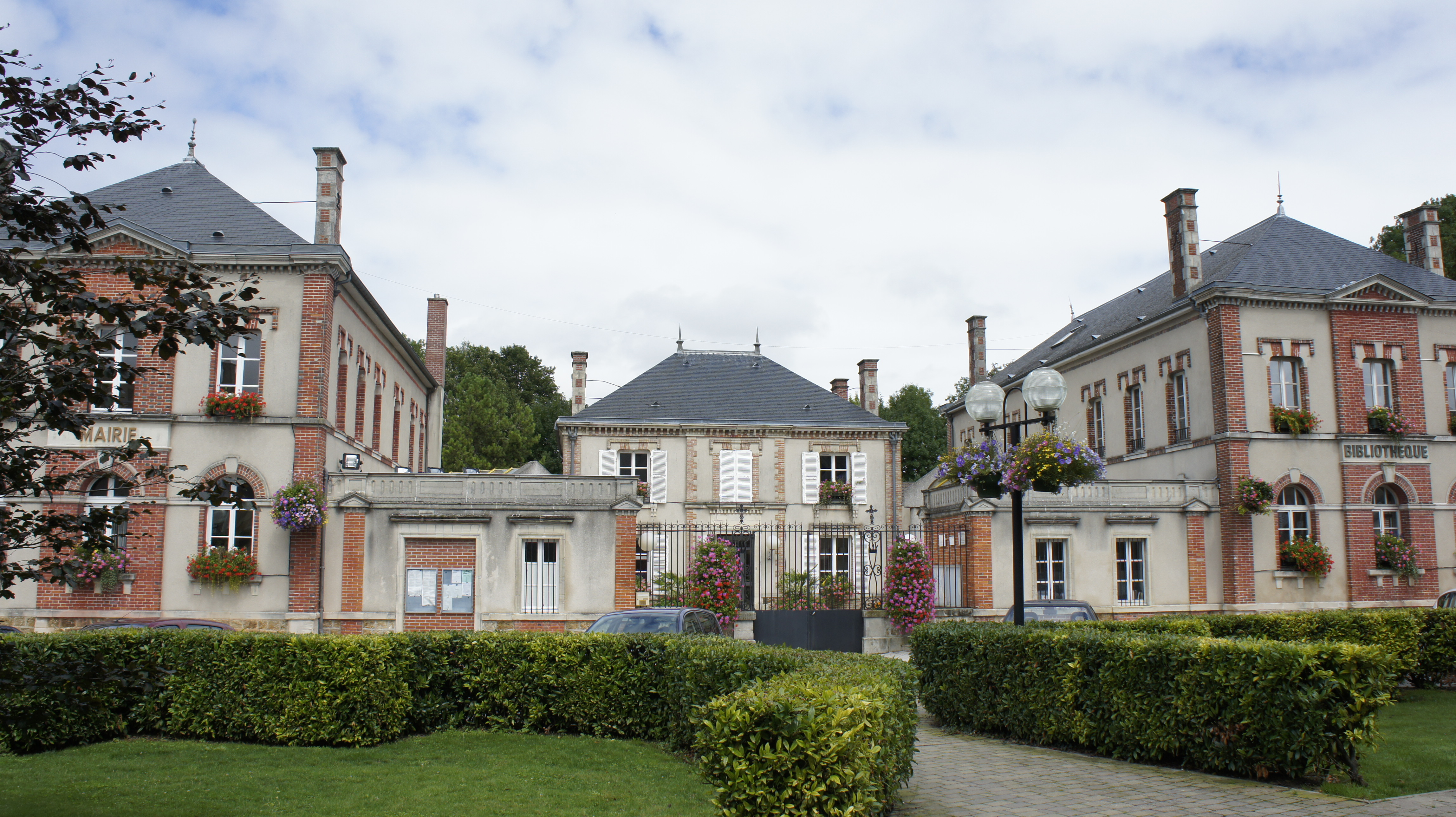 Une vue de la mairie de Mourmelon.